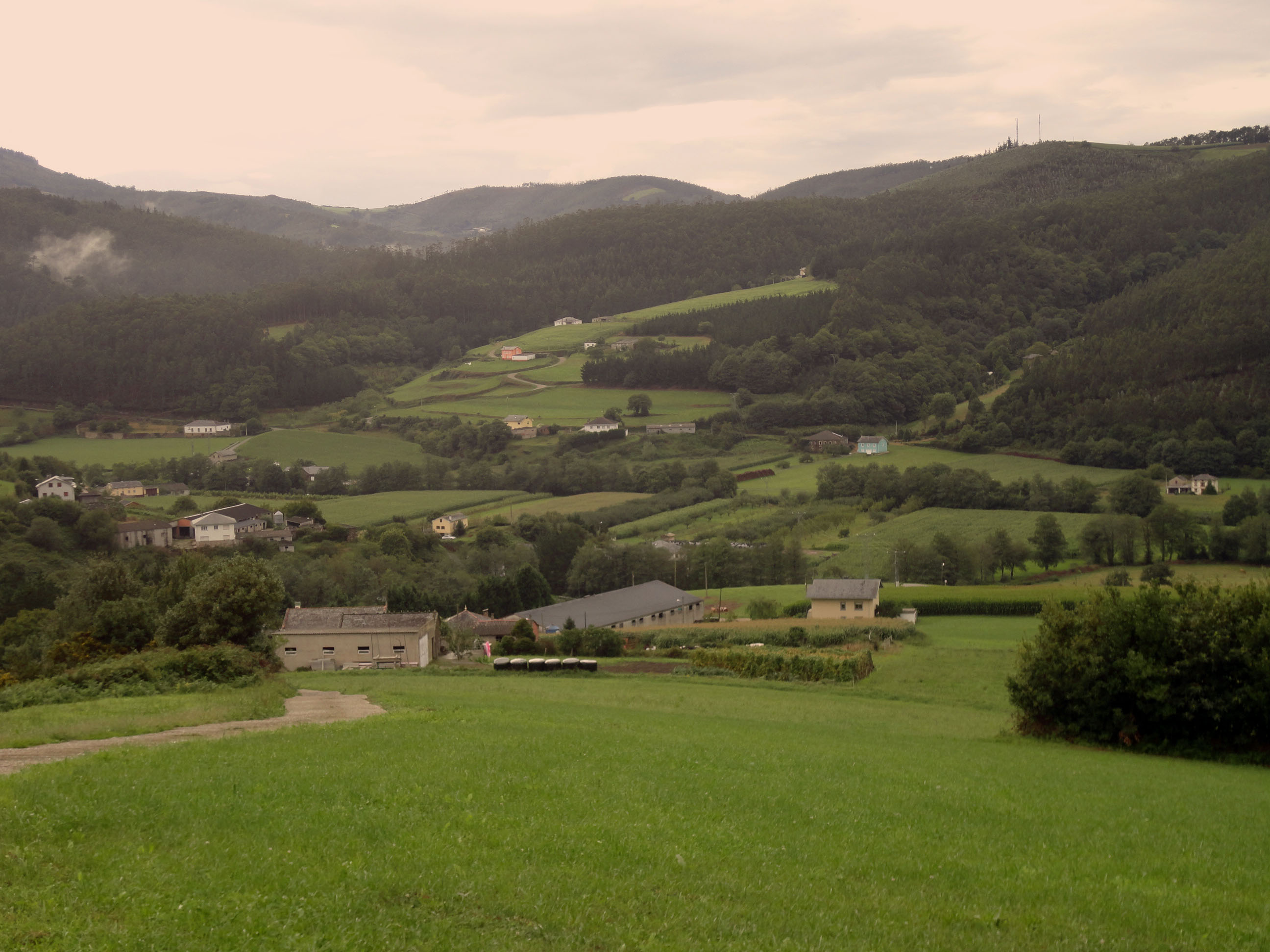 Vista General de La Veguina desde El Campón (Tapia de Casariego Asturias)